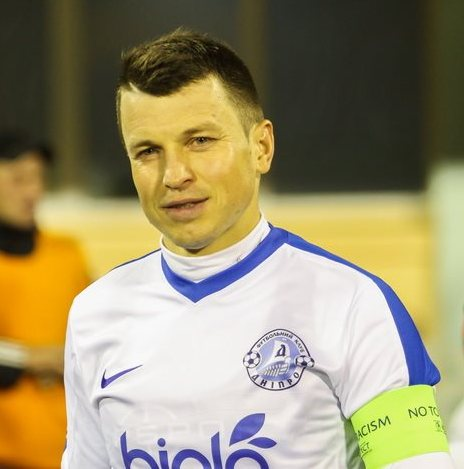 Руслан Ротань - український футболіст